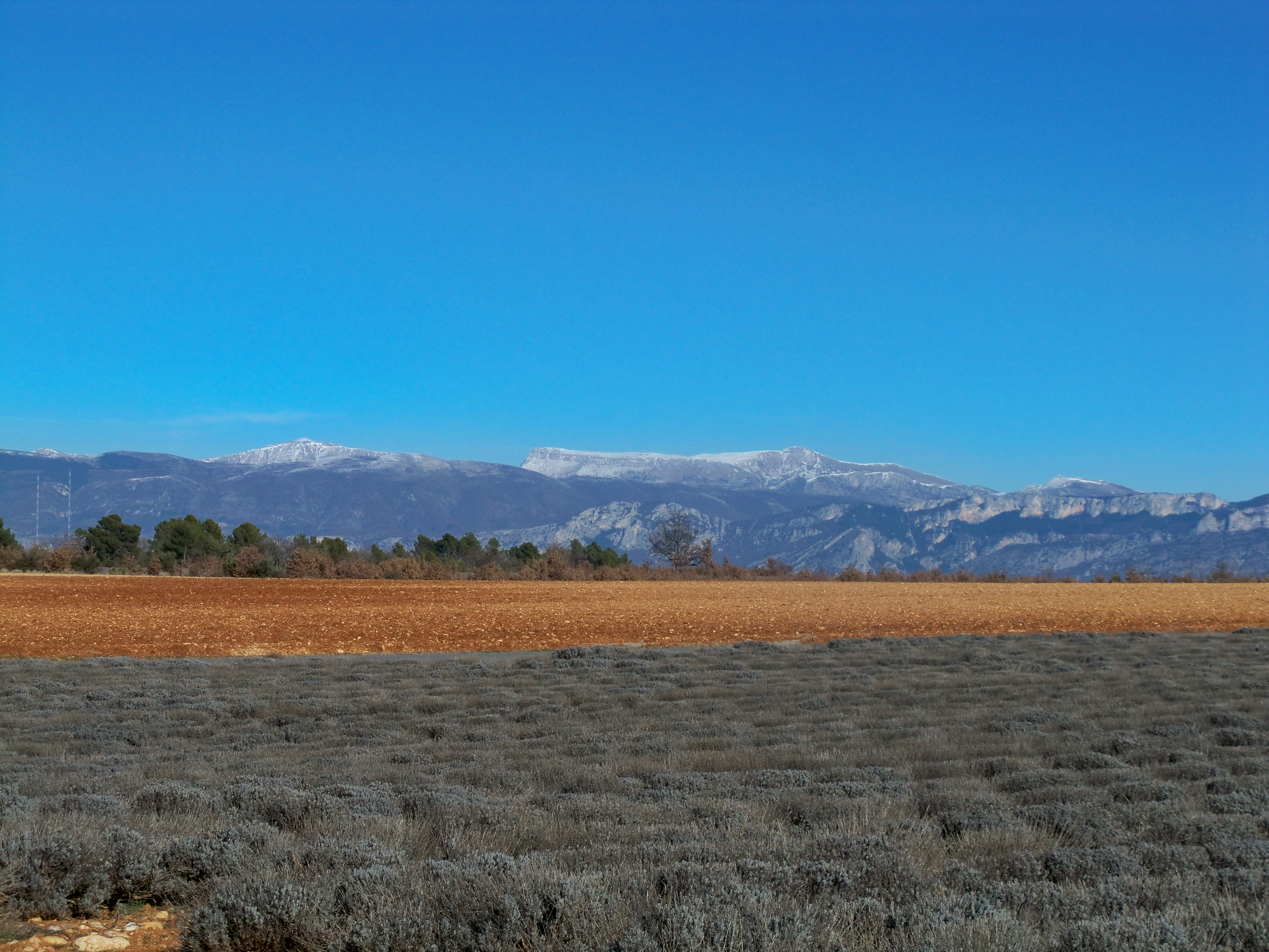 Champs de lavandes près de Quinson (04). Dans le lointain, le Mourre de Chanier (à droite) et du Mont Chiron (à Gauche)